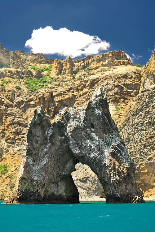 Карадазький ПЗ Крим, м. Феодосія, сел. Курортне.